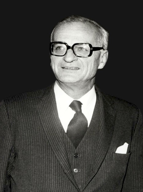 Xavier de La Chevalerie